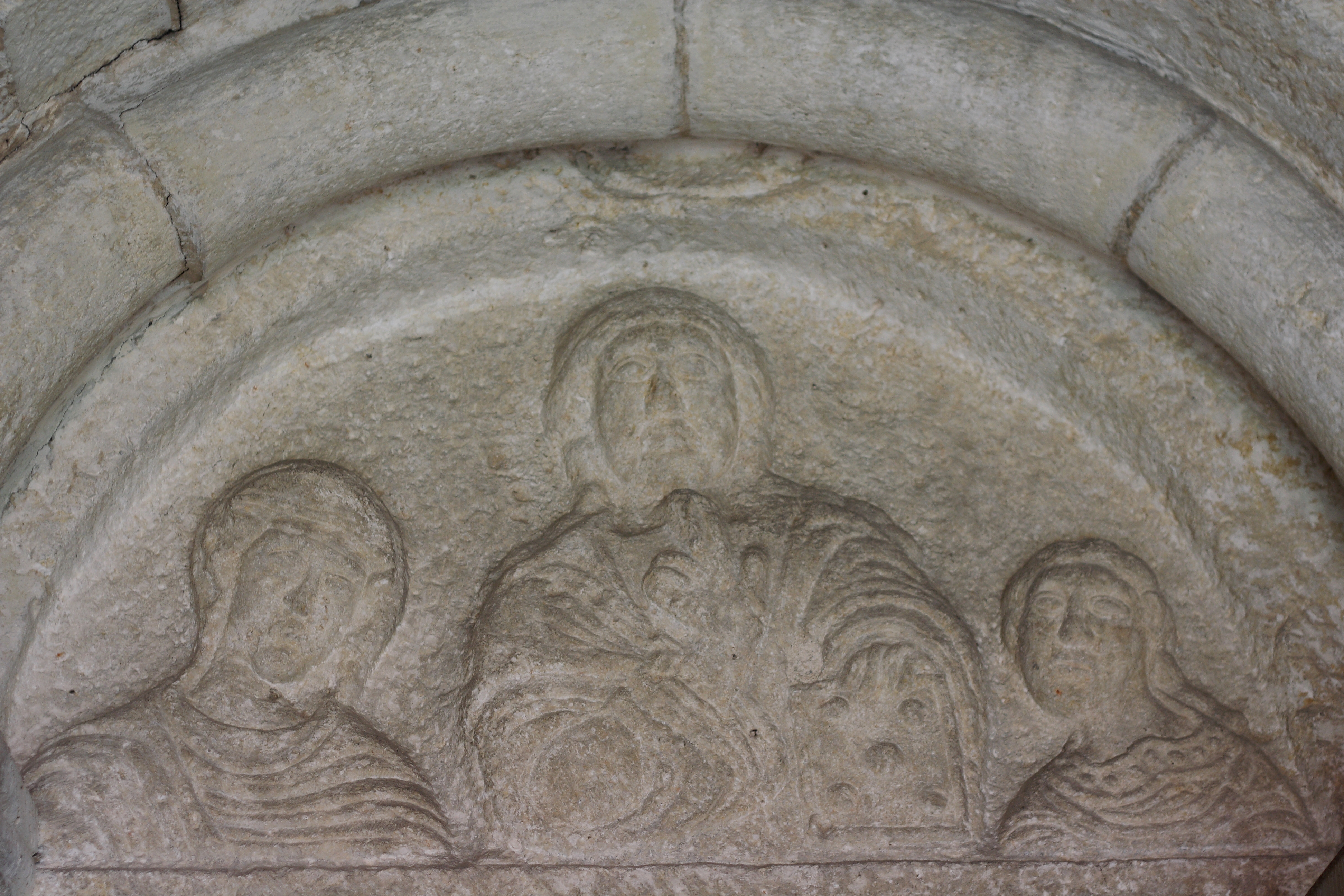 Evangelische Kirche St. Gallus in Brenz an der Brenz, einem Ortsteil von Sontheim an der Brenz (Baden-Württemberg), Tympanon des Südportals